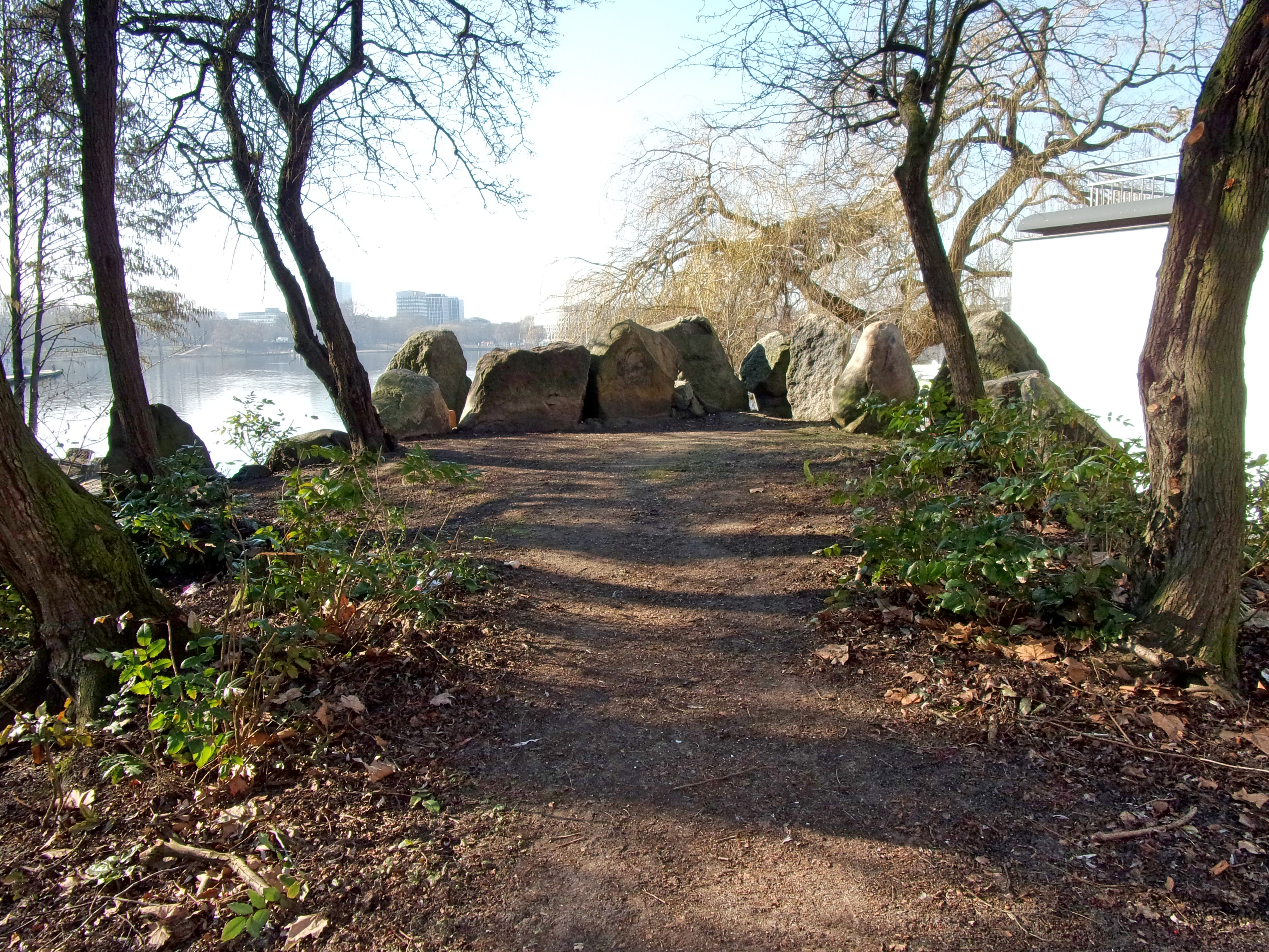 Felsen der Gurlitt-Insel An der Alster in St. Georg.